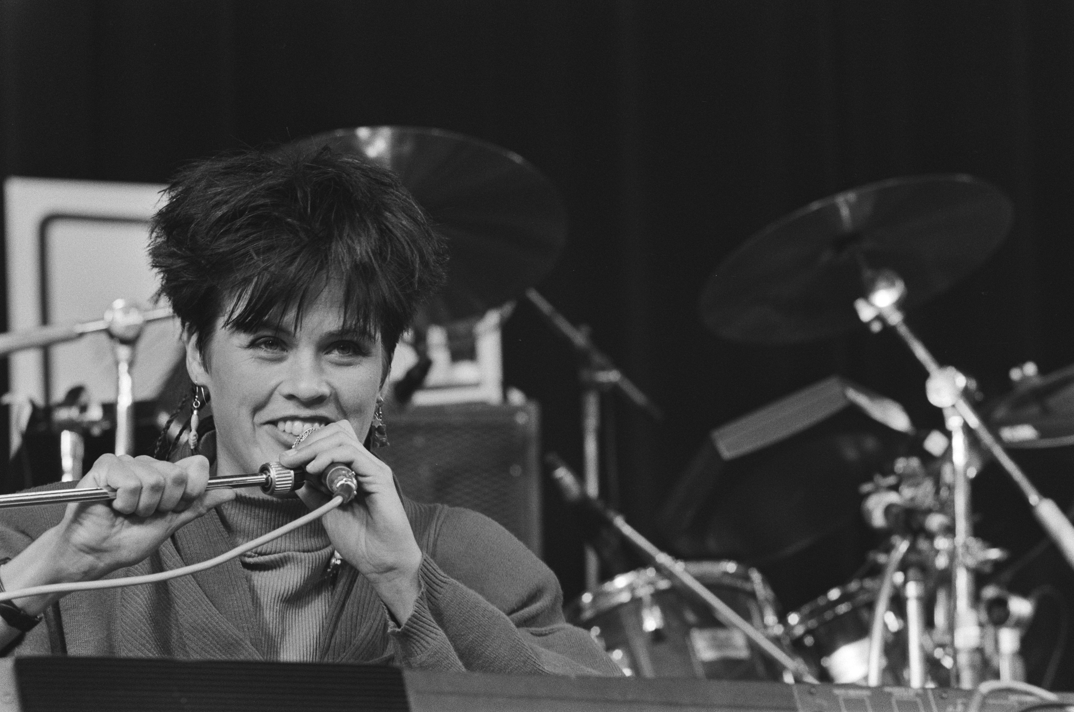 Slotmanifestatie volkspetitionnement in Den Haag ; Fay Lovski treedt op.